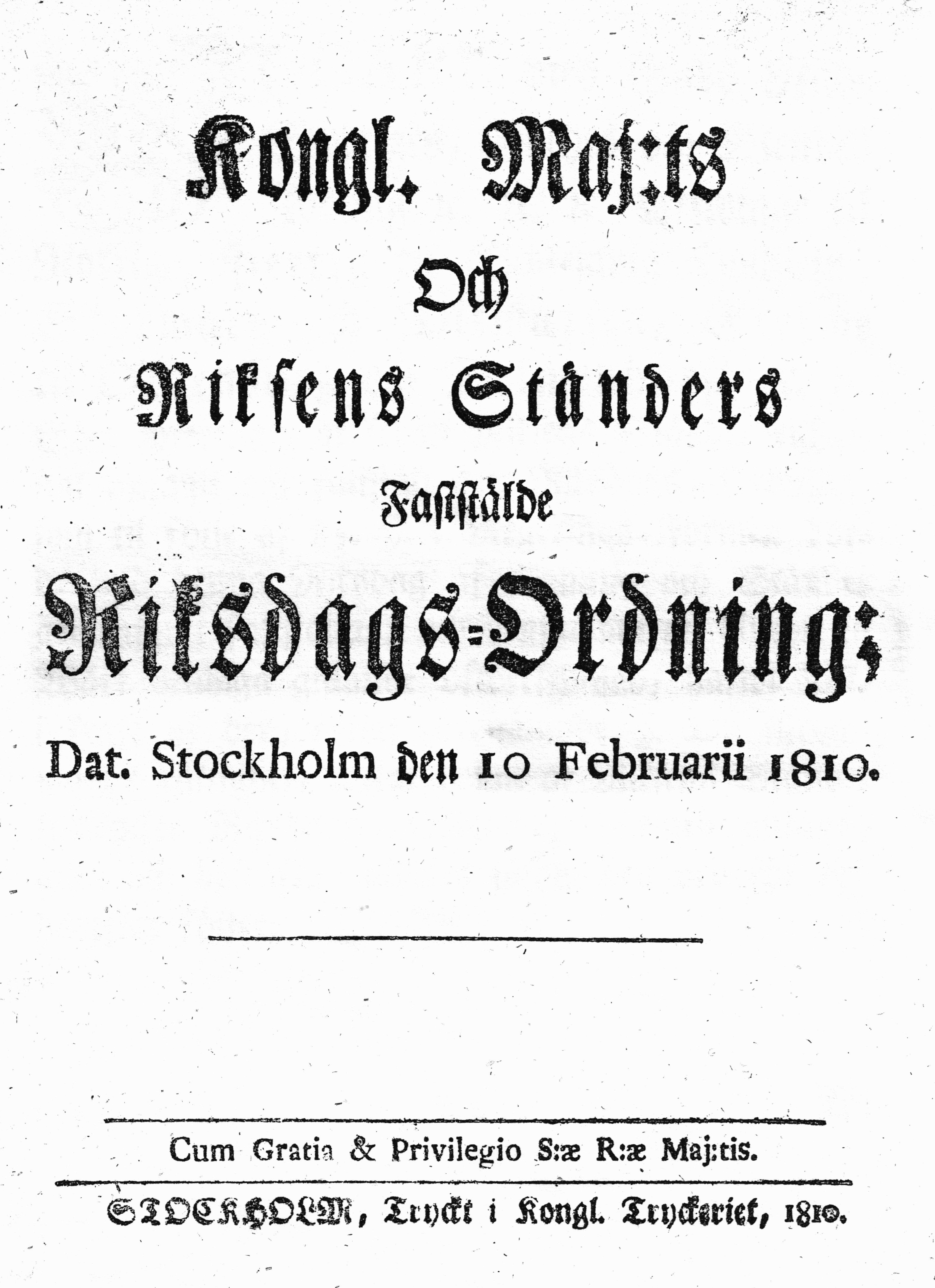 Riksdagsordningen 1810